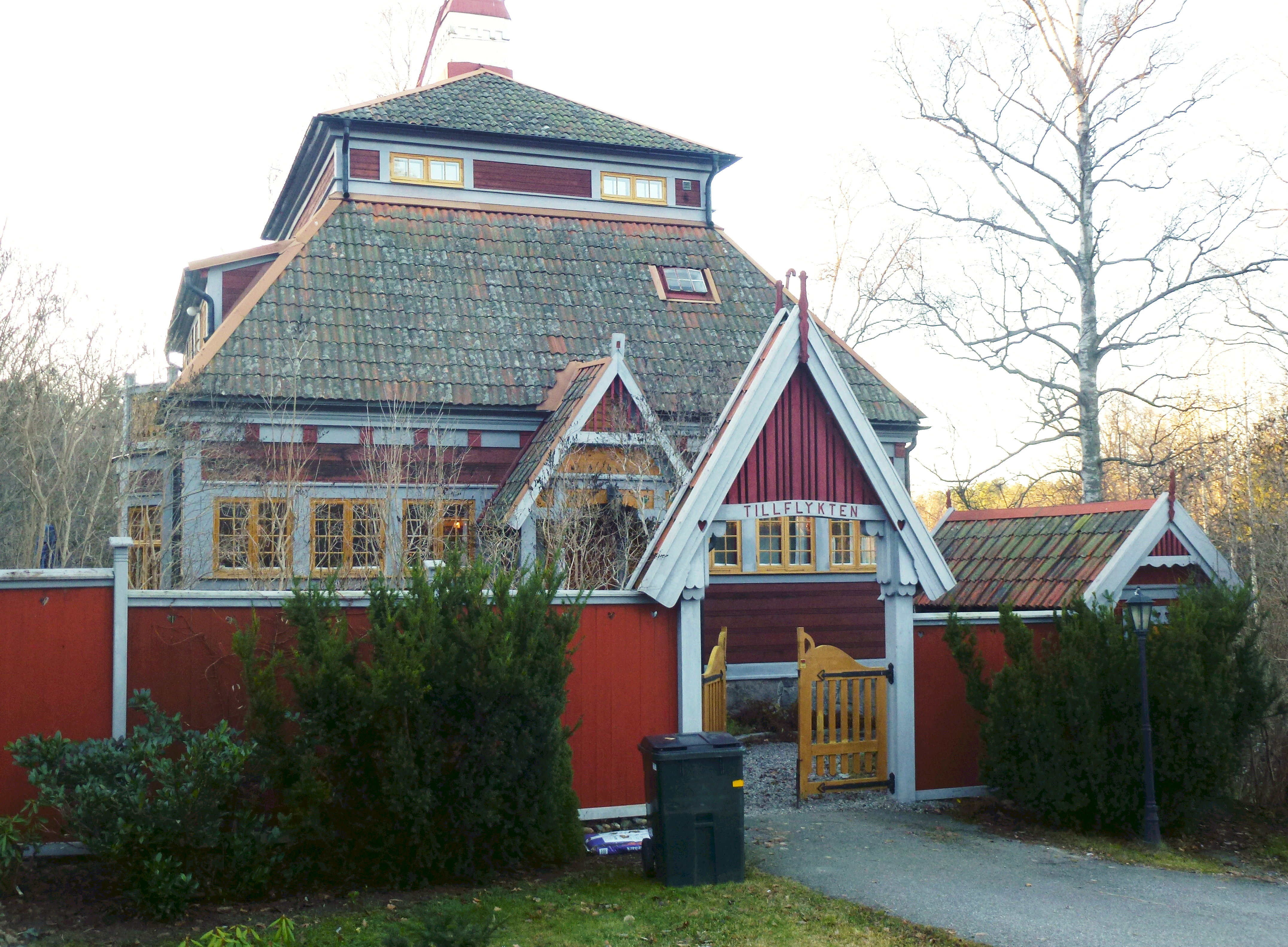 Villa Tillflykten, Storängens strandväg 1, arkitekt Arvid Bjerke. Kallas även Villa Leander. Villa Leander ritades år 1905 av arkitekt Arvid Bjerke på uppdrag av journalisten Hans Leander. Åren 1921-1936 var författaren och historikern E Alfred Jansson bosatt i villan.